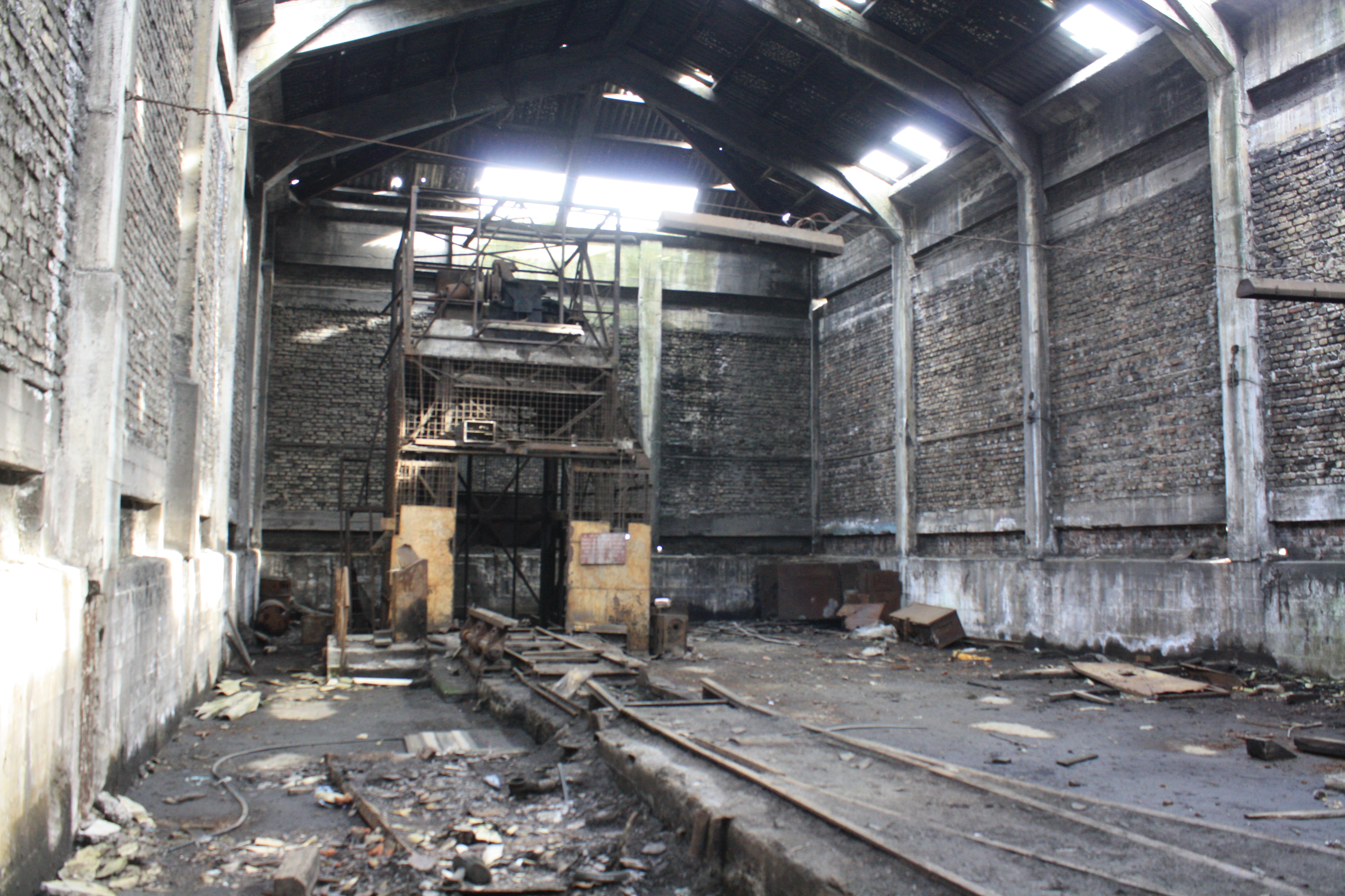 torre exterior del pique This is a photo of a national monument in Chile: 2028